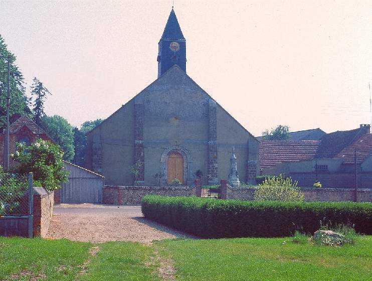 Berchères-la-Maingot - L'église Saint-Pierre et le monument aux Morts, Berchères-Saint-Germain, Eure-et-Loir (France).